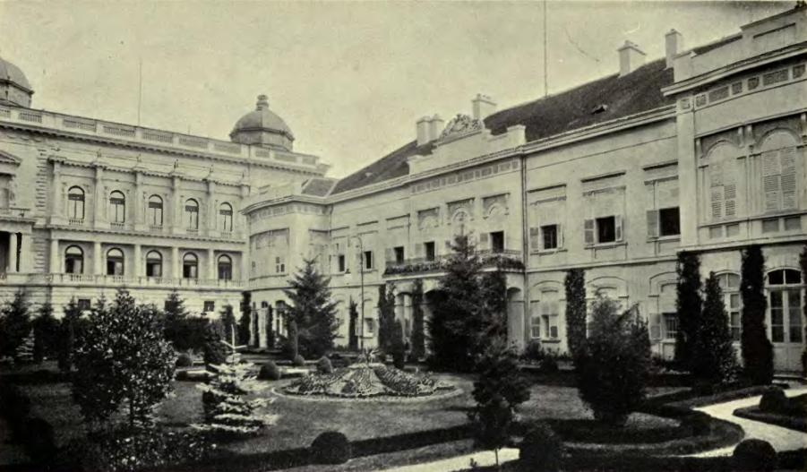 El palacio real serbio donde asesinaron a Alejandro I y su esposa Draga.